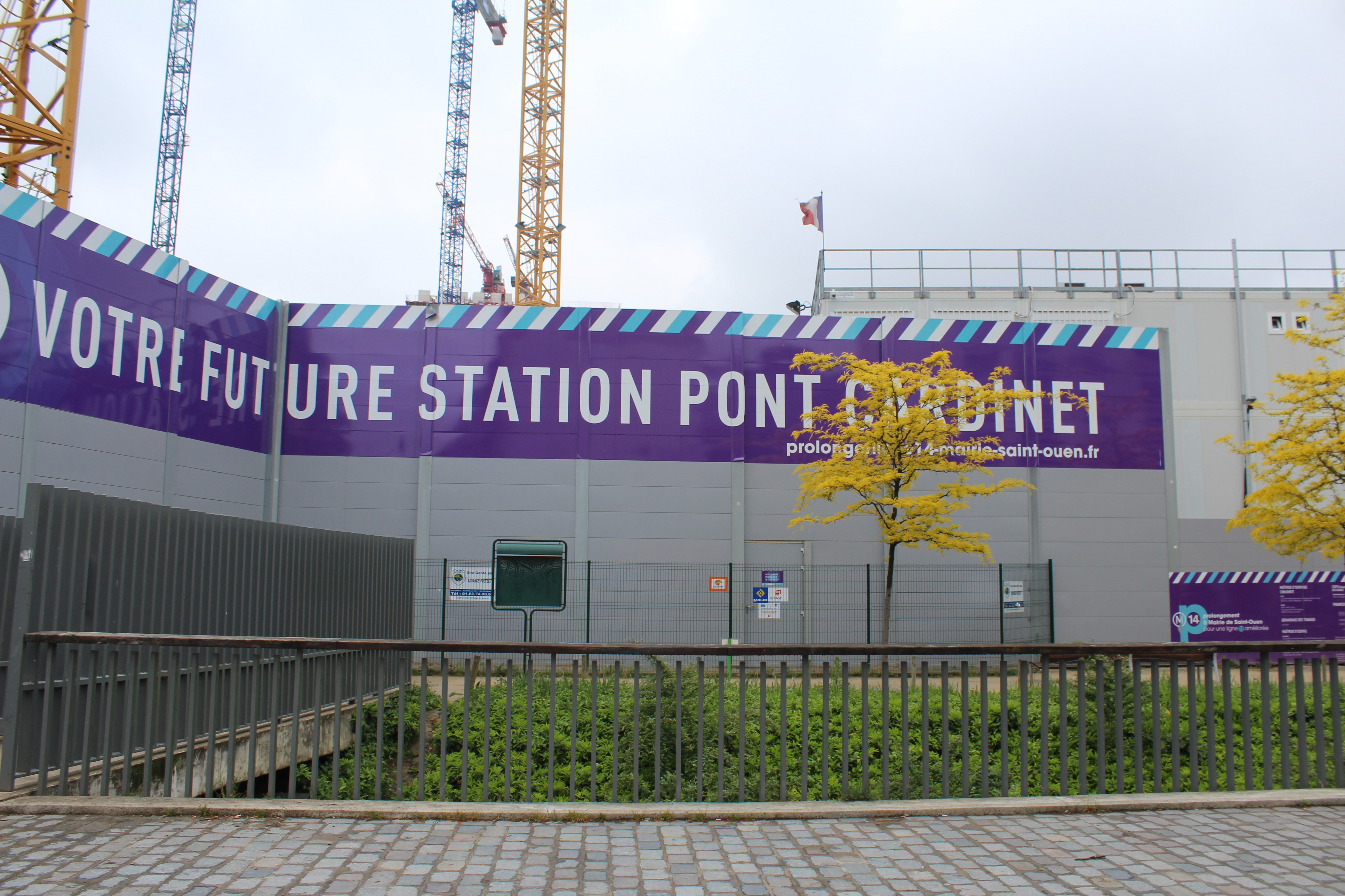 Chantier à la station de métro Pont Cardinet dans le cadre de l'extension nord de la ligne 14 du métro parisien.